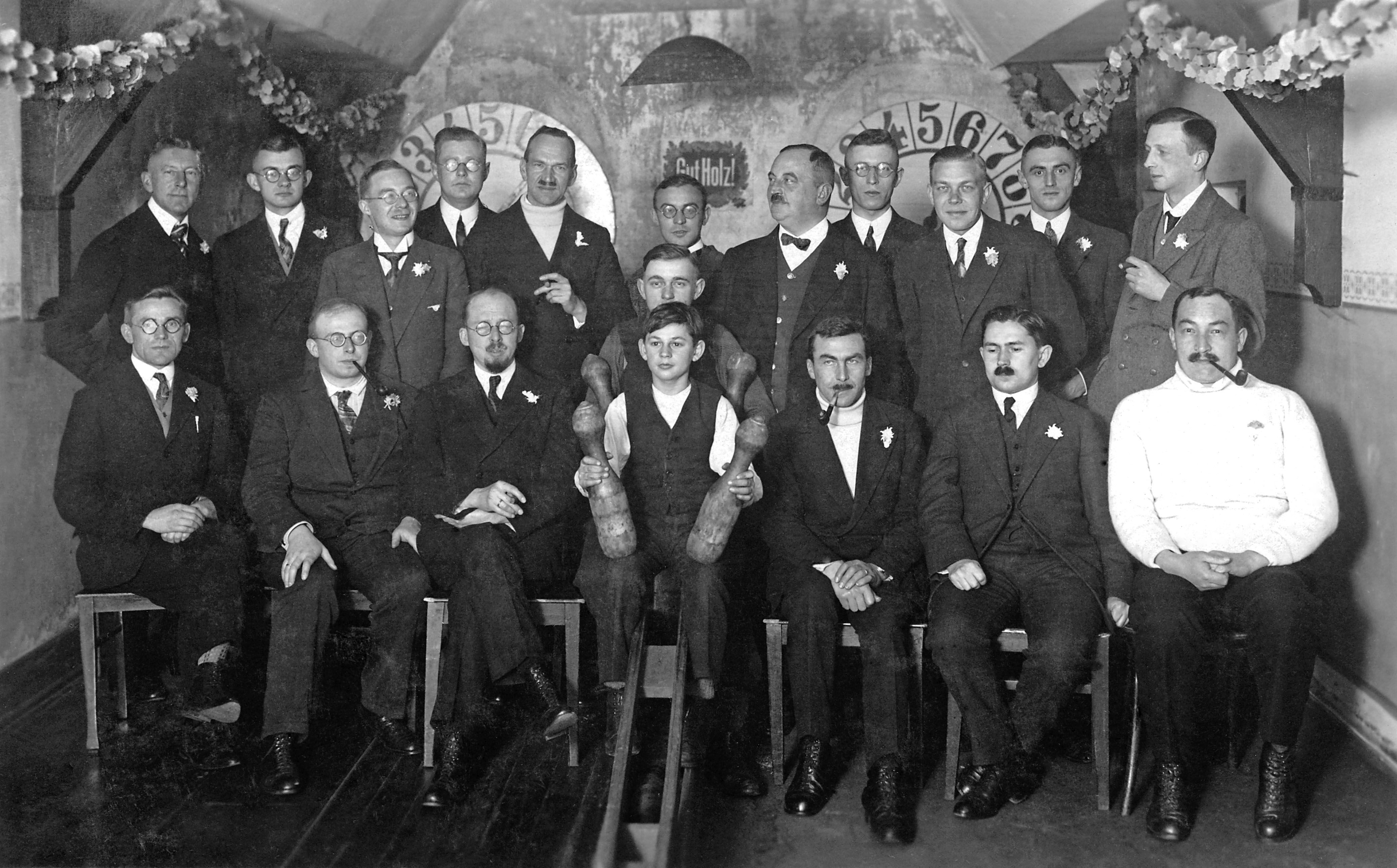 Biologen der BAH der Zwischenkriegszeit Ende 1927 beim Kegeln mit Akademikern (meist der Bauverwaltung) Mitte, stehend mit Weste und Fliege, Wilhelm Mielck, Direktor der Anstalt. Rechts sitzend in weißem Pullover Arthur Hagmeier, sein Nachfolger ab 1934. Vorne 2.v.l. mit Pfeife Adolf Bückmann, Direktor von 1953-1962. Oben 2.v.l. (neben 1. v. l. Inselapotheker Saure) der Biologe Karl Meunier, ab 1933 NS-Ortsgruppenleiter, er beanspruchte Macht auch in der Anstalt, Mielcks früher Tod 1933, wurde ihm vorgeworfen. Helmuth Hertling stehend r. mit Zigarre, unterstützte ihn, beide waren schon 1933 in der NSDAP, sie lehnten 1937 im Parteigericht den Antrag Hagmeiers nach 4 Jahren bei der SA in die Partei aufgenommen zu werden einmal ab. Bückmann – wie auch Clemens Künne (2. v. r. stehend) war es so gelungen. Rudolf Drost – unten 3. von li. mit Bart - hielt sich fern von der NSDAP. Neben Meunier steht rechts Ernst Schreiber, dann Hans-Heinz Kieckebusch, unten li. von Hagmeier sitzt Alfred Schubert. Es fehlt Alfred Wulff, Kassenwart der Partei, der 1938 wegen seiner Homosexualität seinen Arbeitsplatz verlor.